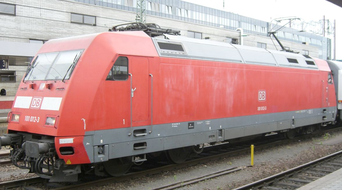 E-Lok 101 012 vor IC-Zug in Saarbrücken Hbf